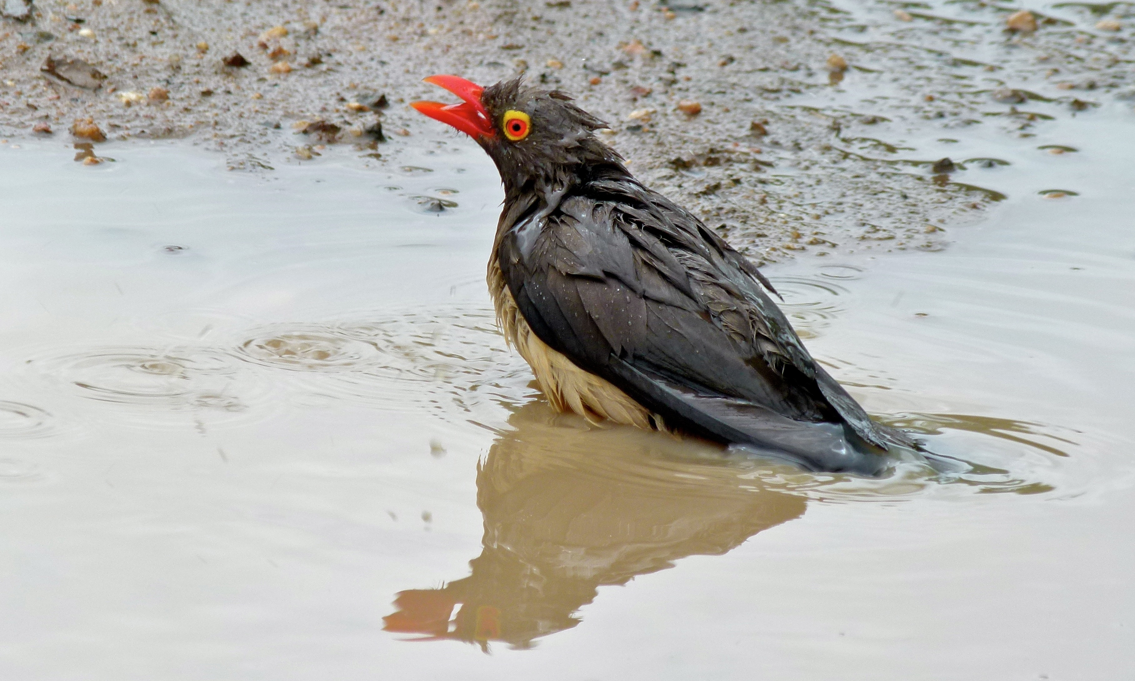 H1-2 Leeupan, Kruger NP, SOUTH AFRICA